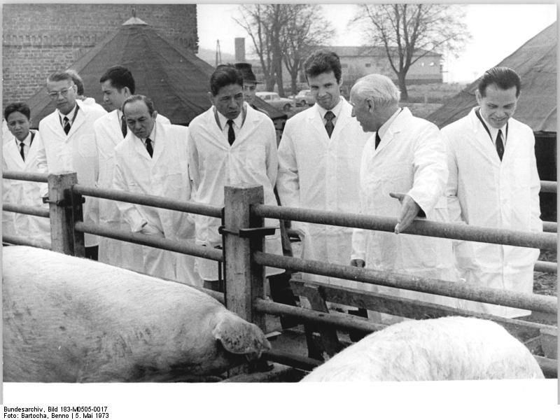 LPG Gielow, Besuch durch laotische Delegation ADN-ZB Bartocha ro-5-5-73-Neubrandenburg: Laotische Patrioten bei Mecklenburger Genossenschaftsbauern-Die gegenwärtige in der DDR weilende Delegation des Zentralkomitees der Patriotischen Front von Laos wurde am Sonnabend von den Genossenschaftsbauern und Einwohnern der Gemeinden Gielow und Schwinkendorf im Kreis Malchin herzlich empfangen. Unser Bild zeigt die Delegation bei der Besichtigung der Herdbuchzucht in der LPG Gielow. Gerhard Zettler, 2.Sekretär der Bezirksleitung Neubrandenburg der SED (2.v.r.) erläutert den Gästen die Probleme der Viehwirtschaft im Bezirk. Nouhak Phoumsavan, Leiter der Delegation (4.v.r.)